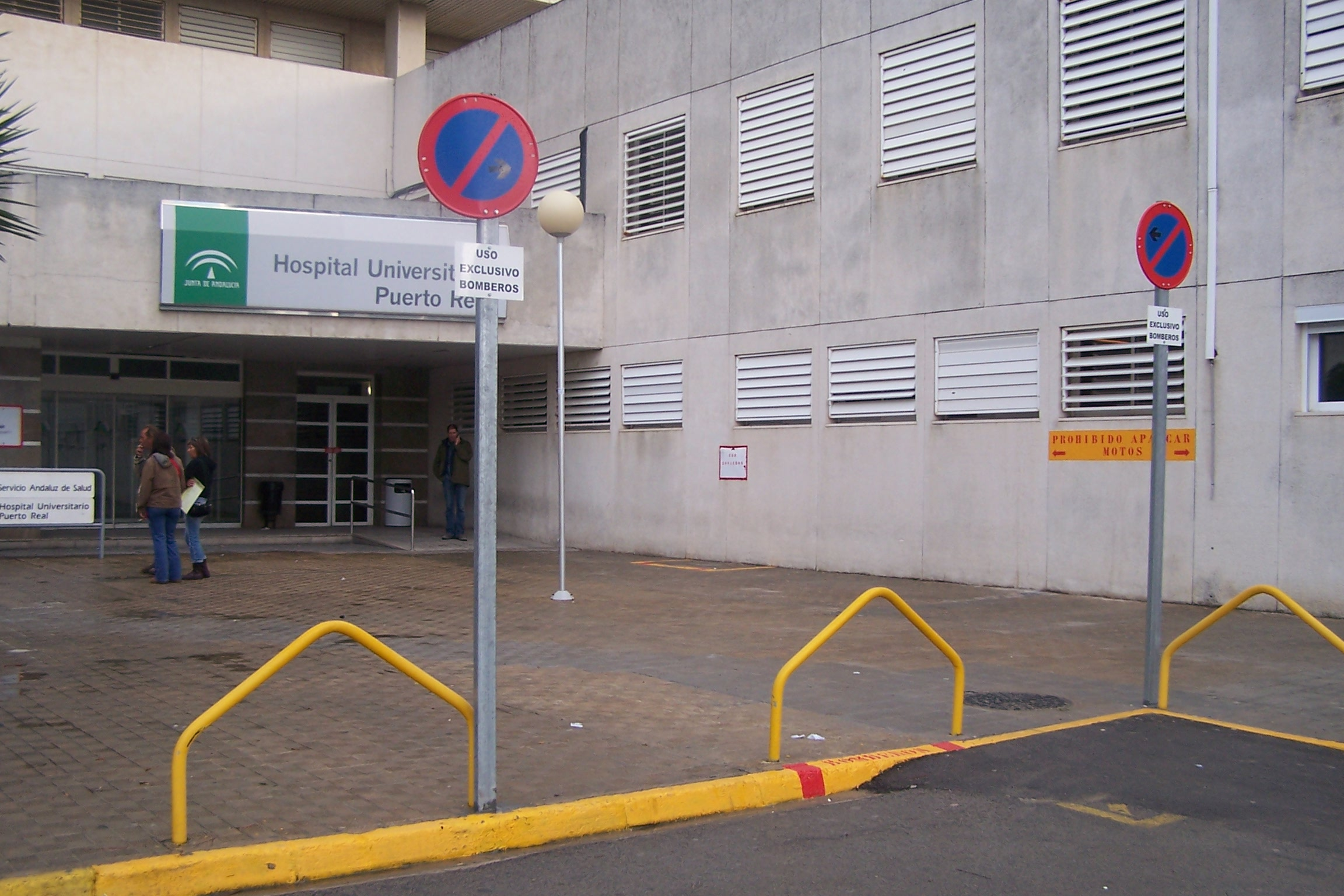 Vista de la entrada principal del Hospital Universitario Puerto Real.